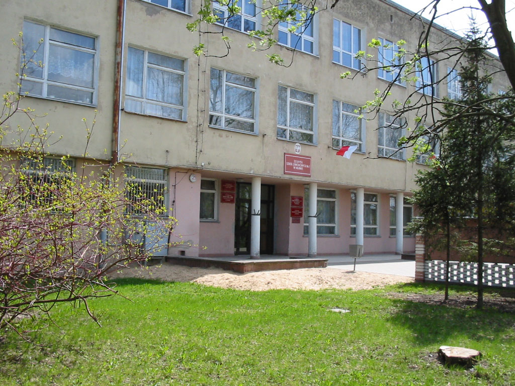 Technikum Budowalne w Mławie, ul. Z. Morawskiej 29